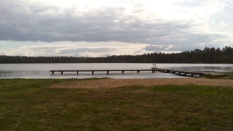 Tahebadet, Tahesjön i maj 2013